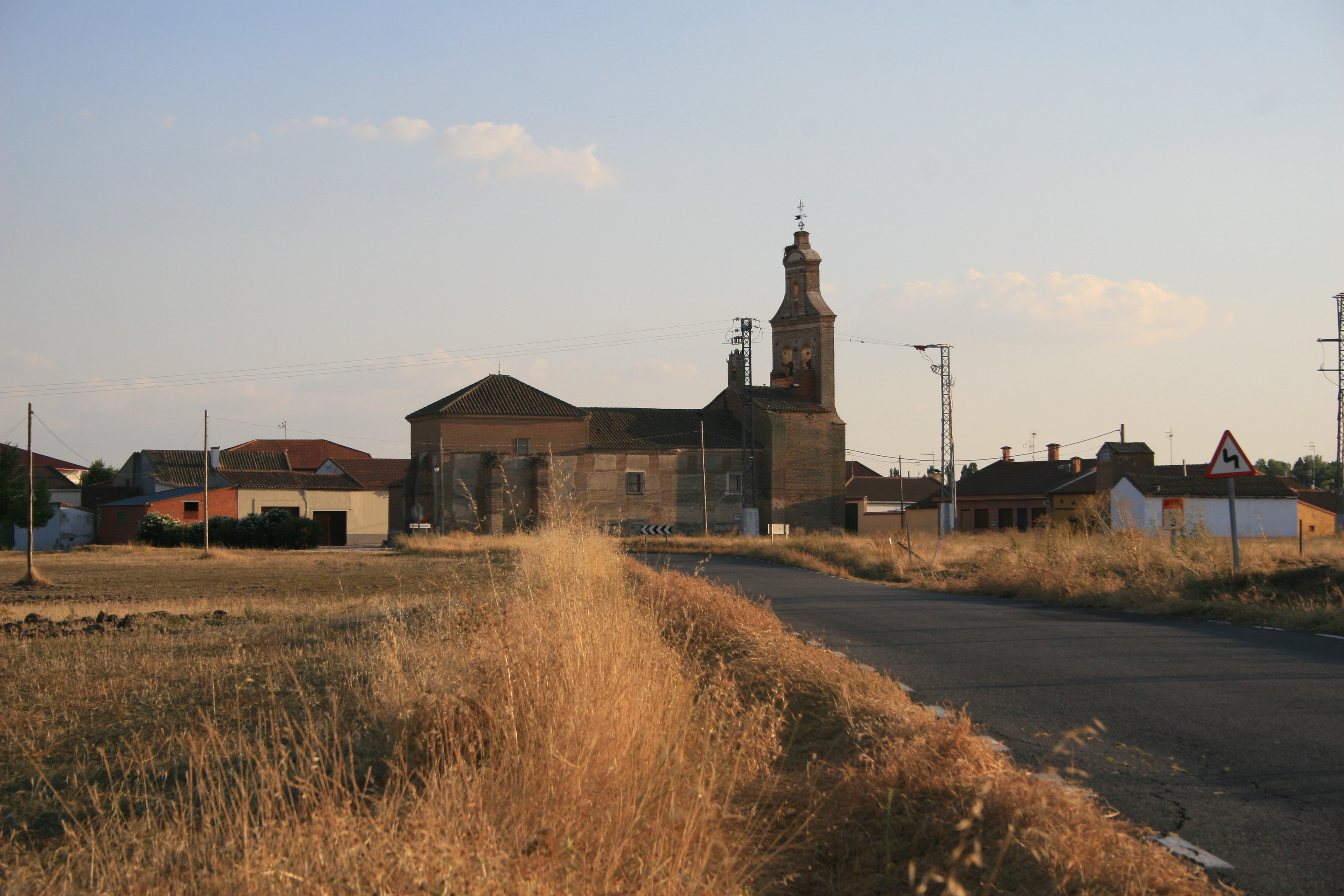 Muñosancho